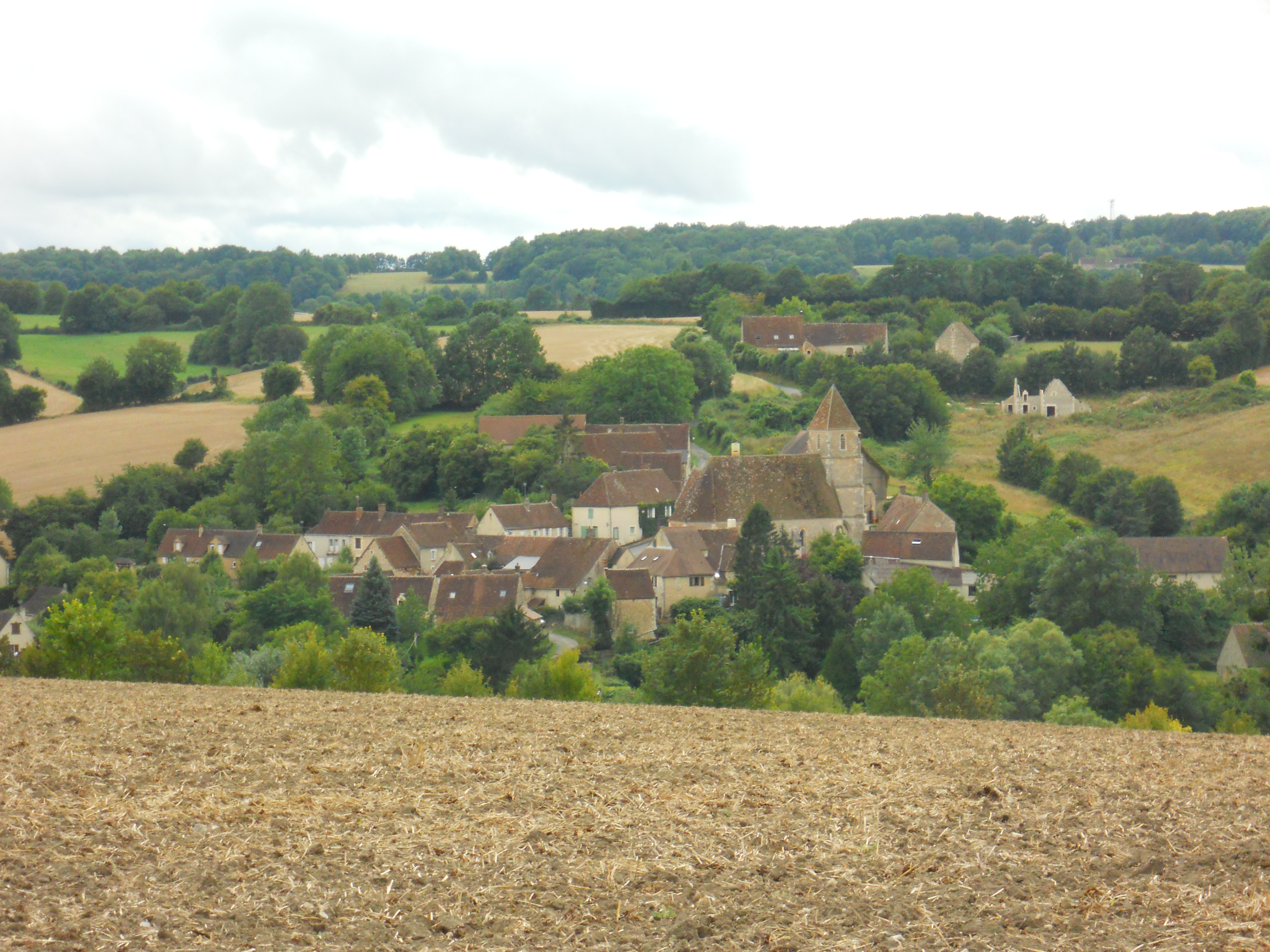 Église Notre-Dame de Vichères, (Inscrit, 1927) .